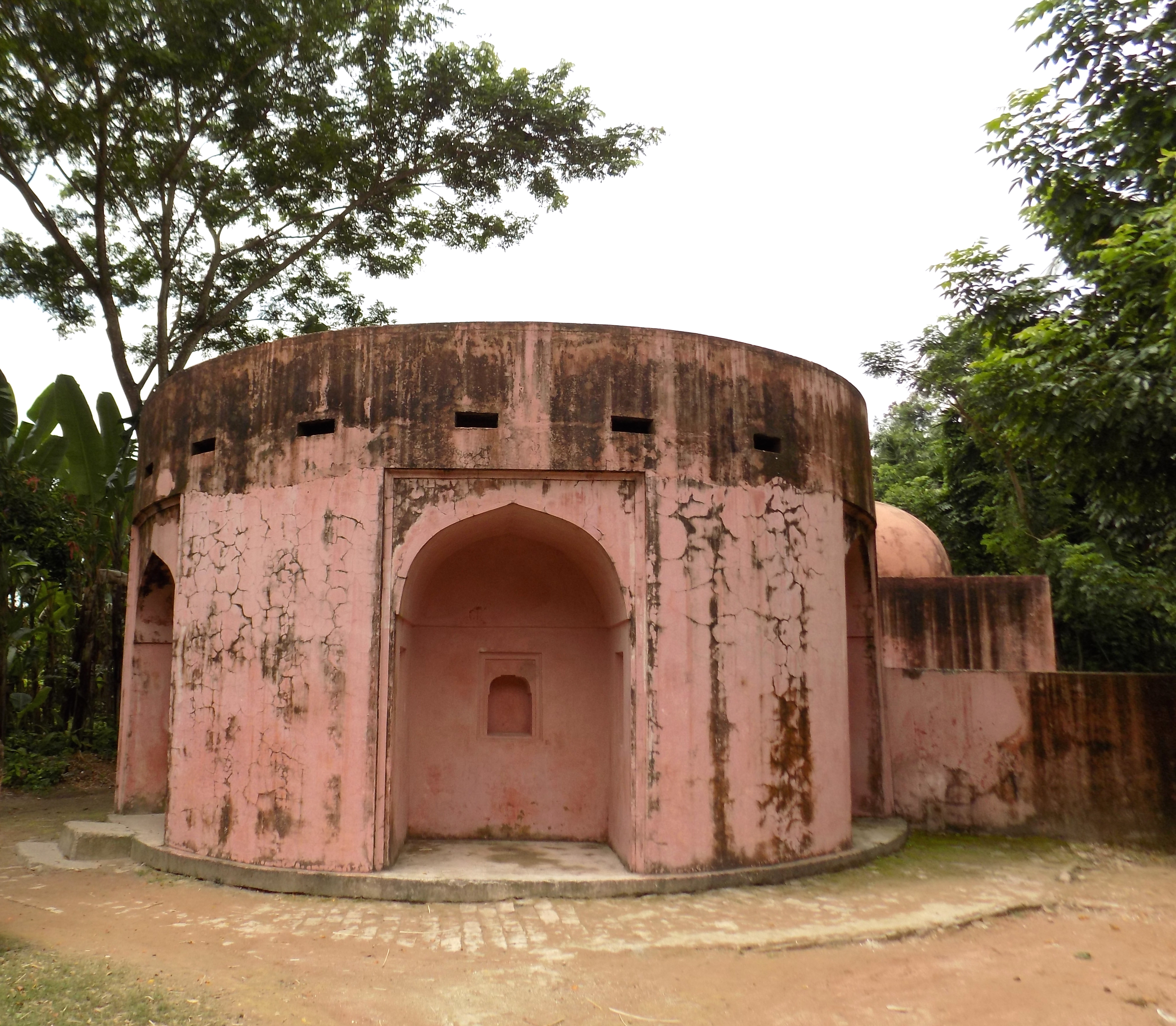 মির্জানগর নবাব বাড়ির হাম্মামখানা